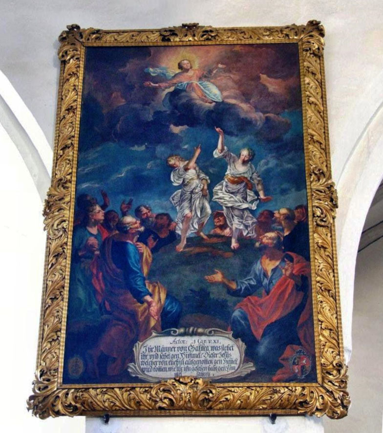 Ölgemälde von den Sichelbeins in St. Martin zu Memmingen